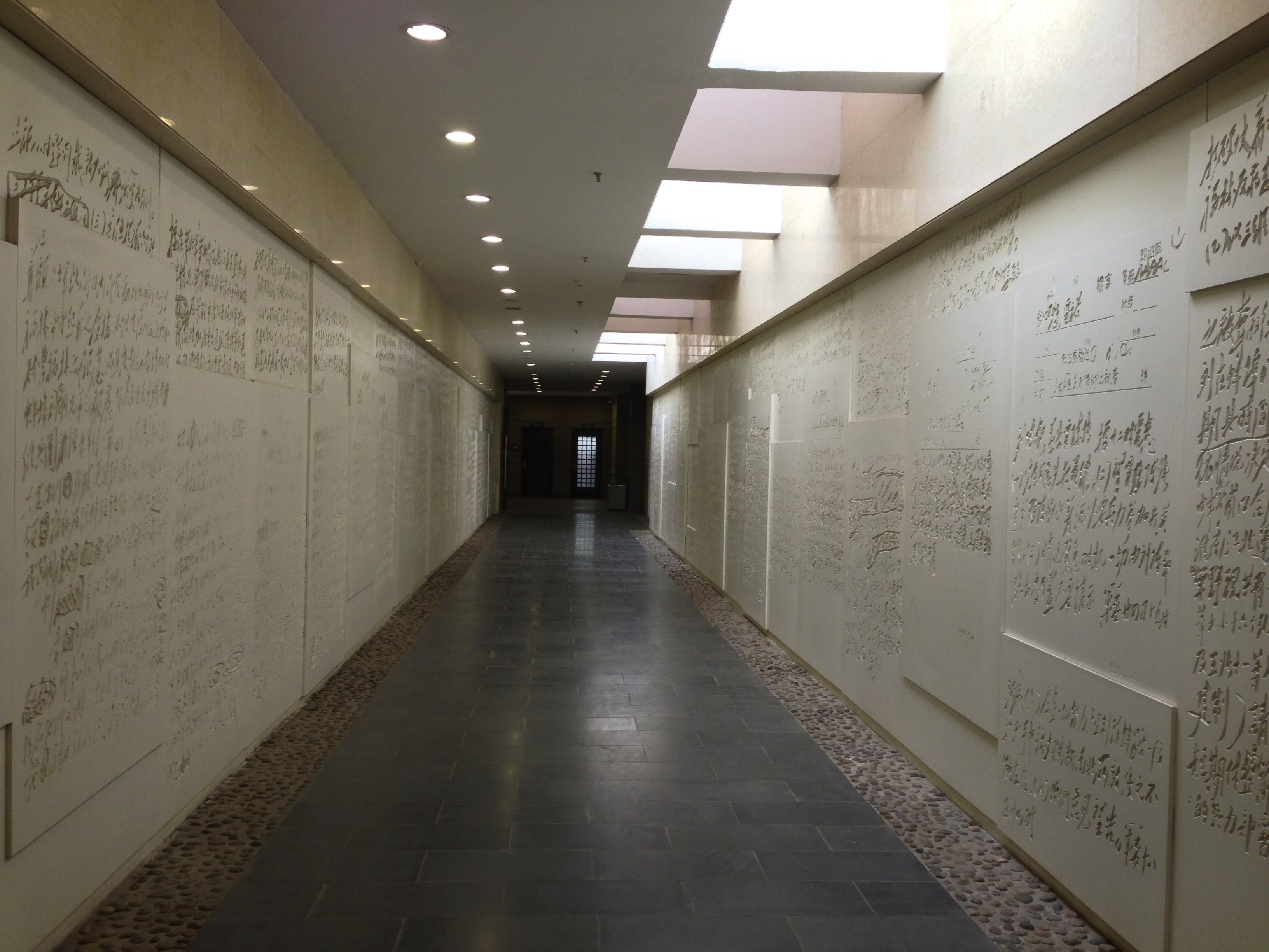 電報長廊